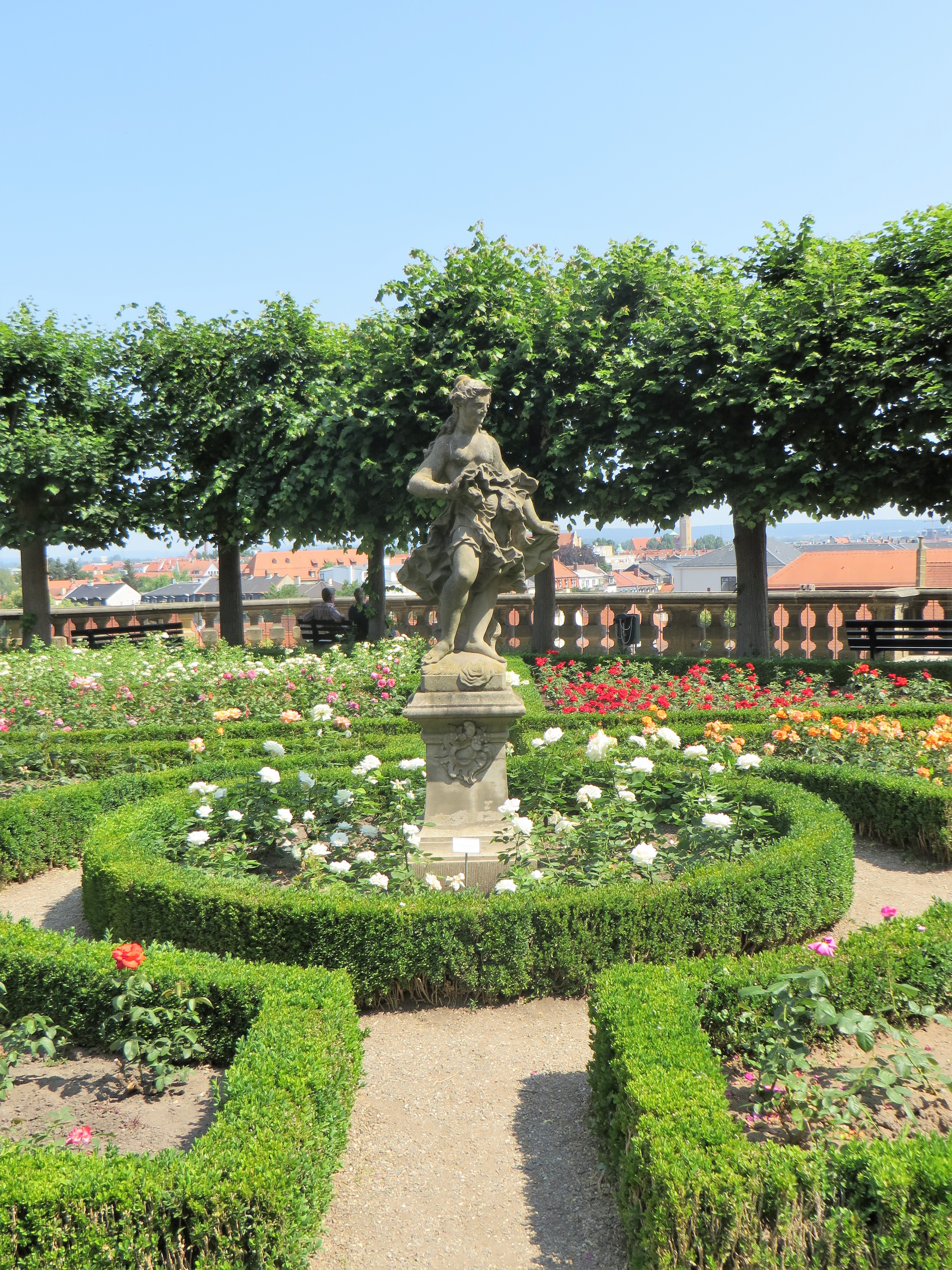 Rondell aus Buchshecke mit der Skulptur der „Ceres“ im Rosengarten Bamberg.